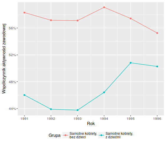 Wykres wskaźnika aktywności zawodowej (LFPR) w grupie Amerykanek objętych i nieobjętych podniesieniem kwoty wolnej od podatku (EITC) w okresie tej zmiany. Zreprodukowane w R na podstawie: alternatywna analiza